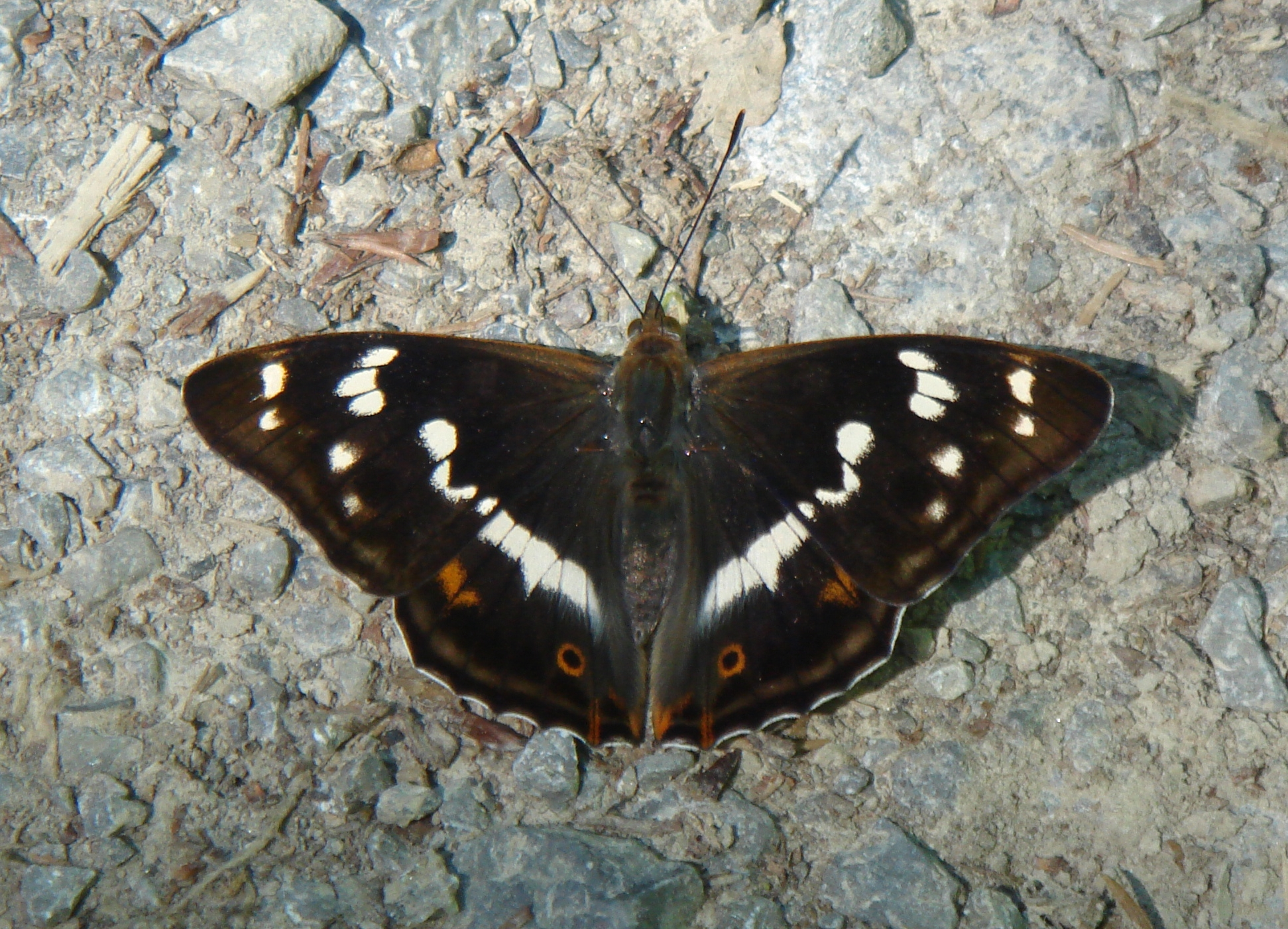 Großer Schillerfalter (Apatura iris